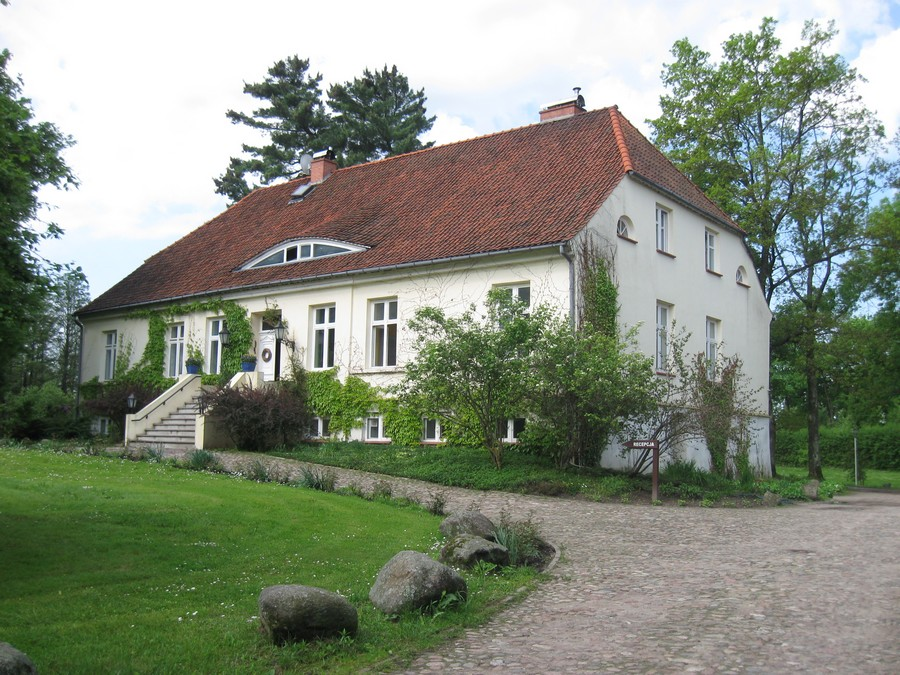 Dwór w Jędrychowie